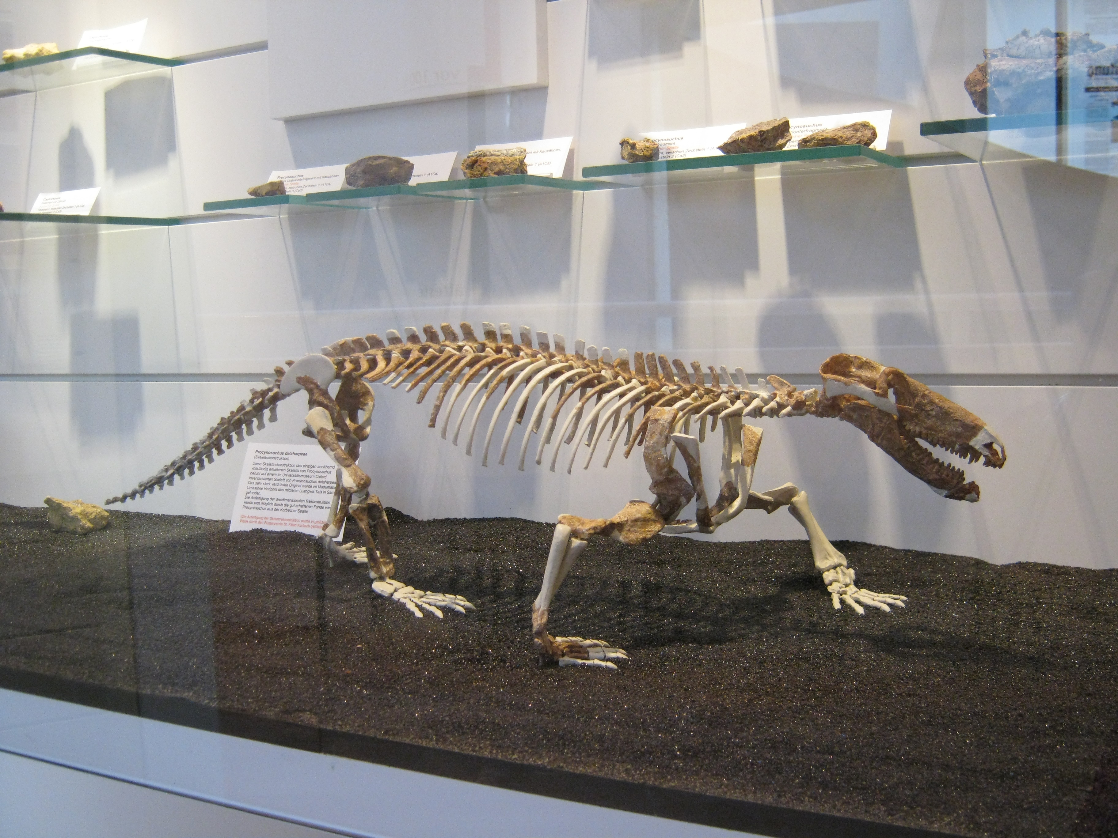 Rekonstruktion des Skeletts eines Procynosuchus („Korbacher Dackel“) im Wolfgang-Bonhage-Museum Korbach